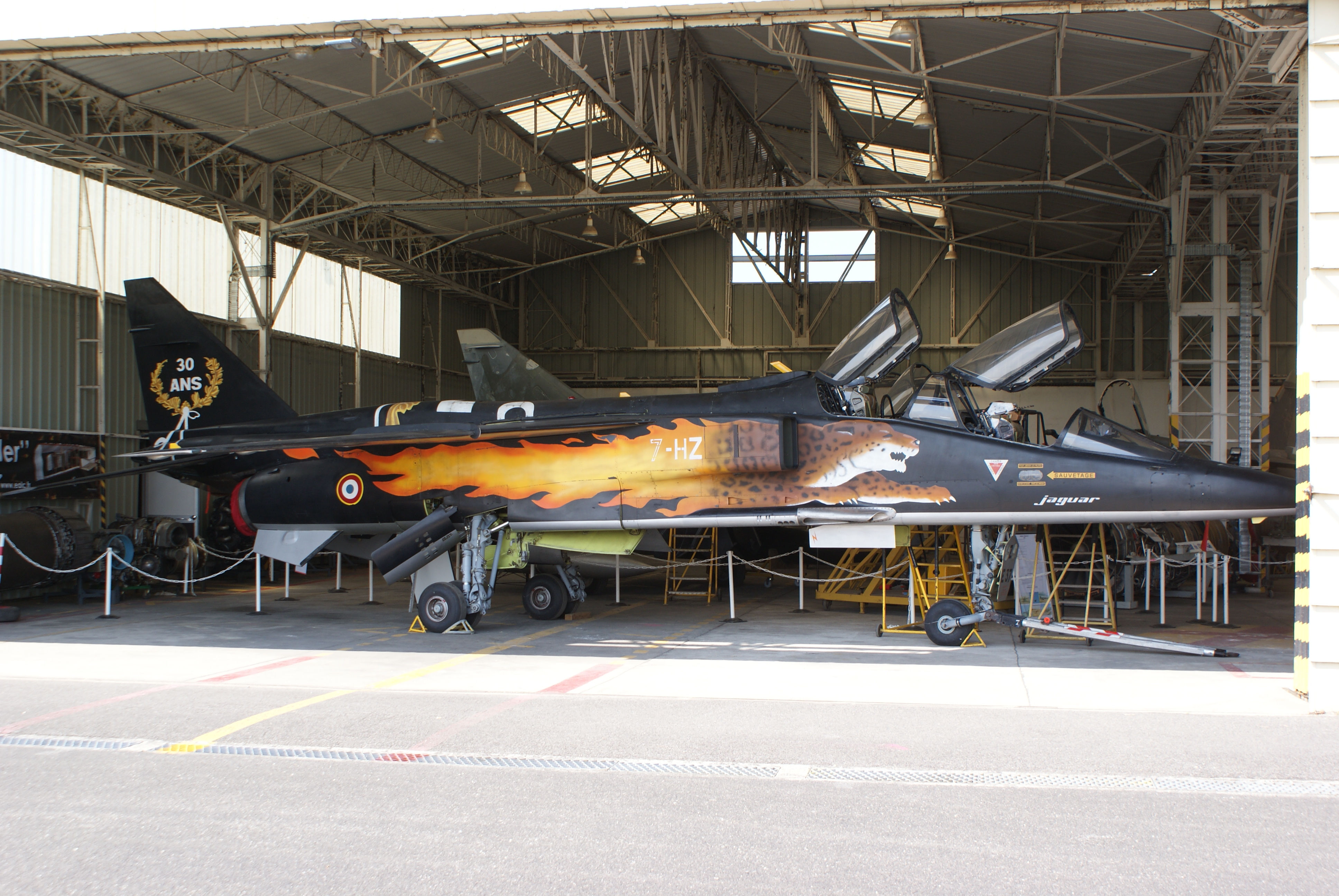 Jaguar E n°37